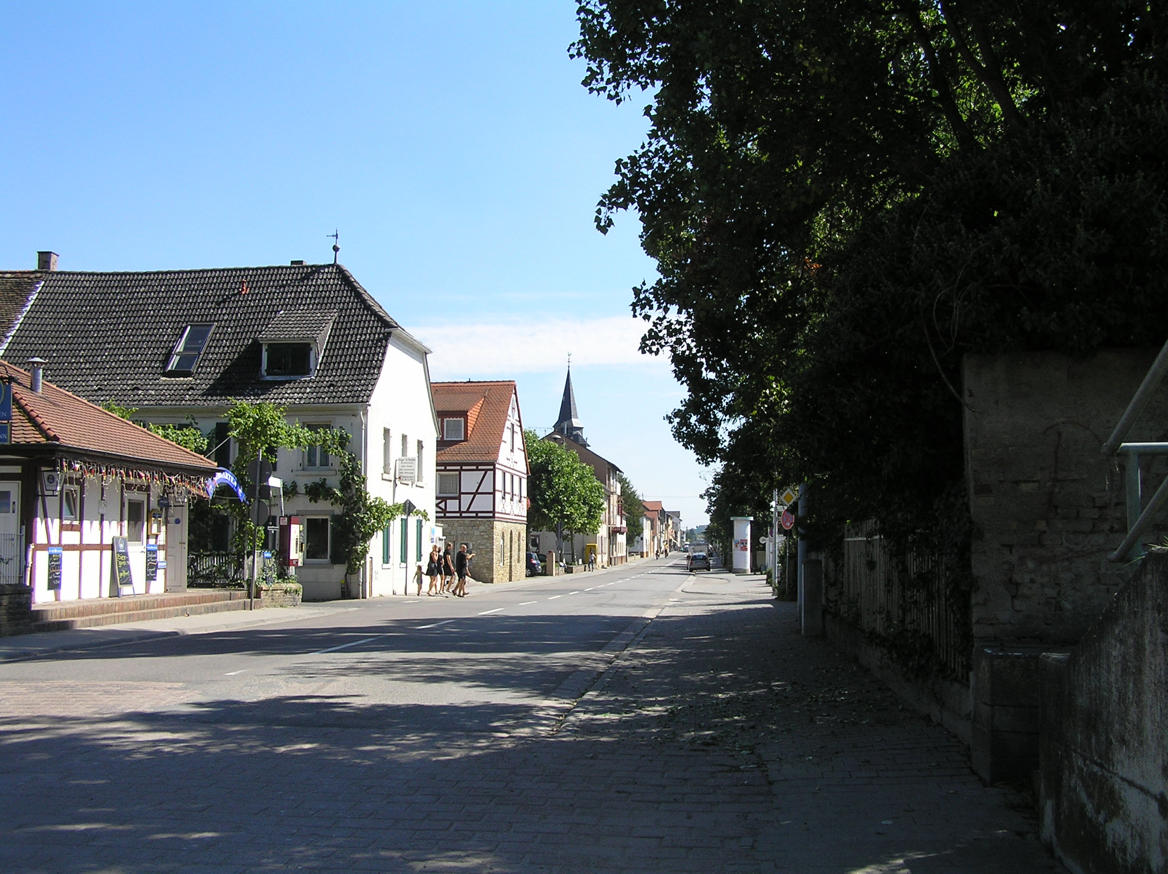 Rheinstraße richtung Stadtmitte im August 2010